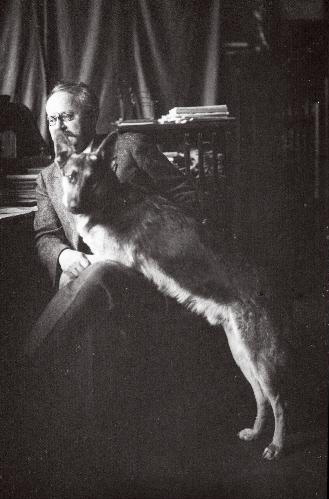 Нейрохирург профессор Людвиг Пуусепп